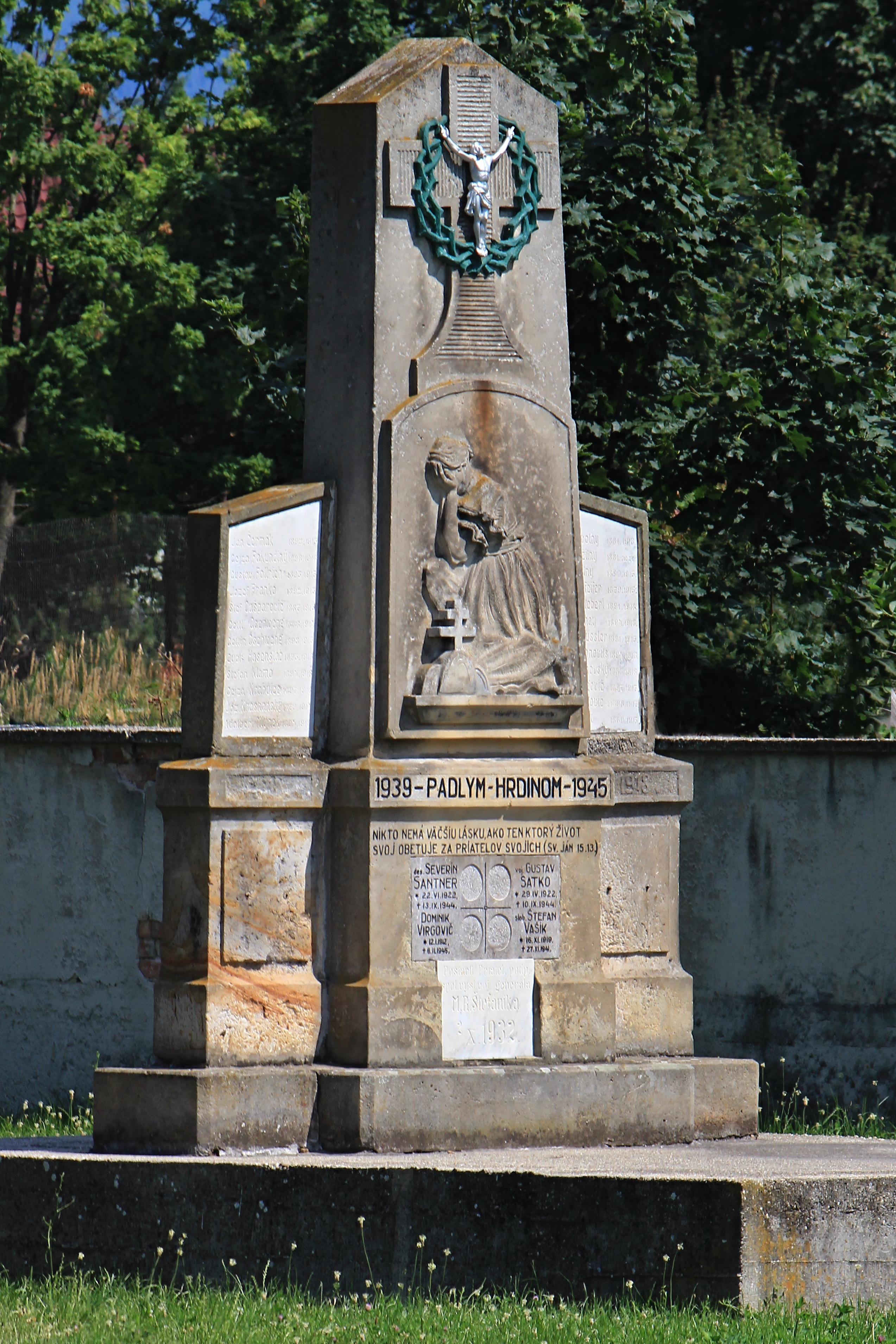 pomník padlým v I. a II. svetovej vojne v Pezinku - časť Grinava